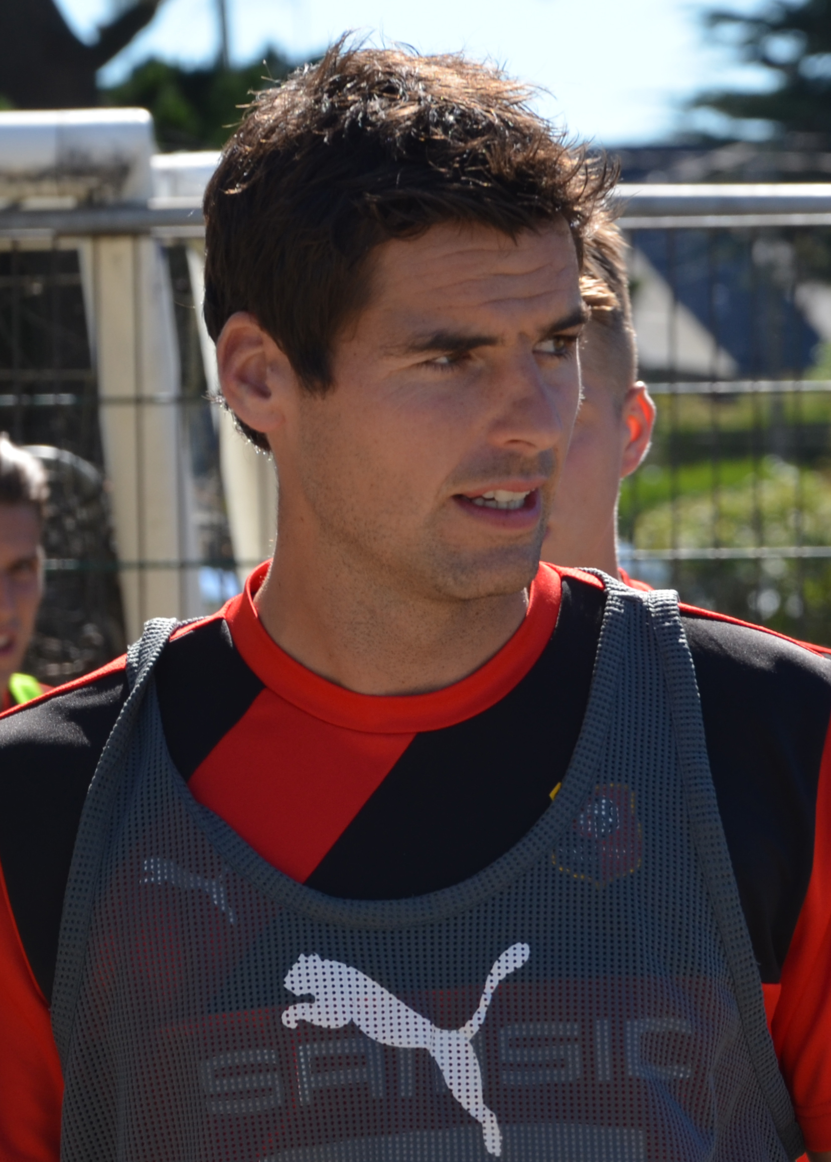 Photographie prise lors du match opposant le Stade rennais à l'USM Alger en match amical au stade Paul-Audrin de Dinard le 16 juillet 2016. Ici, Yoann Gourcuff.